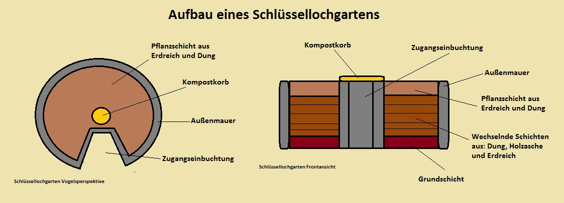 Eine Darstellung des Schlüssellochgartendesigns.